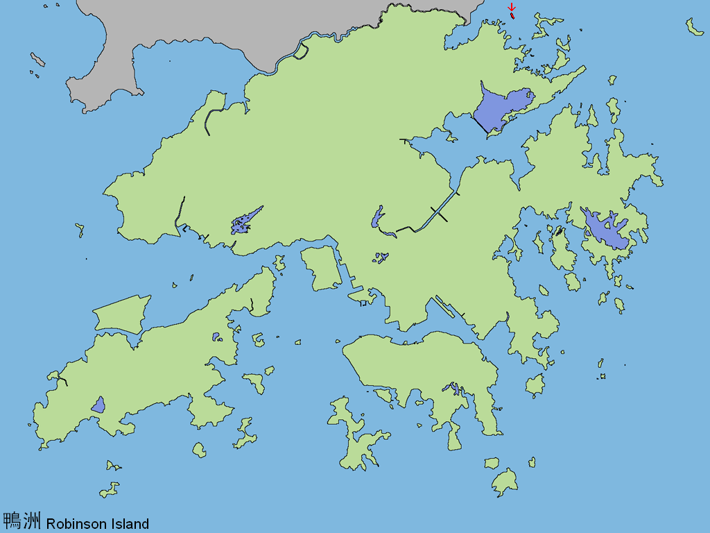 中文（香港）: 鴨洲。